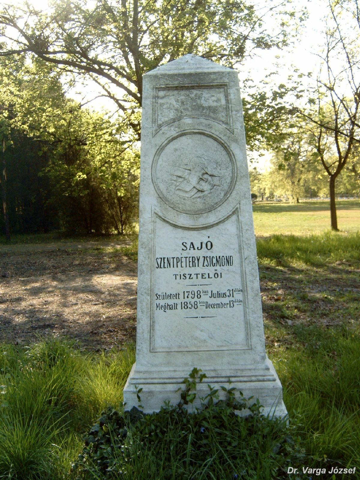 Szentpétery Zsigmond (Rohod, 1798. július 31.–Pest, 1858. december 13) színész, rendező sírja Budapesten. Kerepesi temető: 9-4-56 [kivitelező: Gerenday-cég]